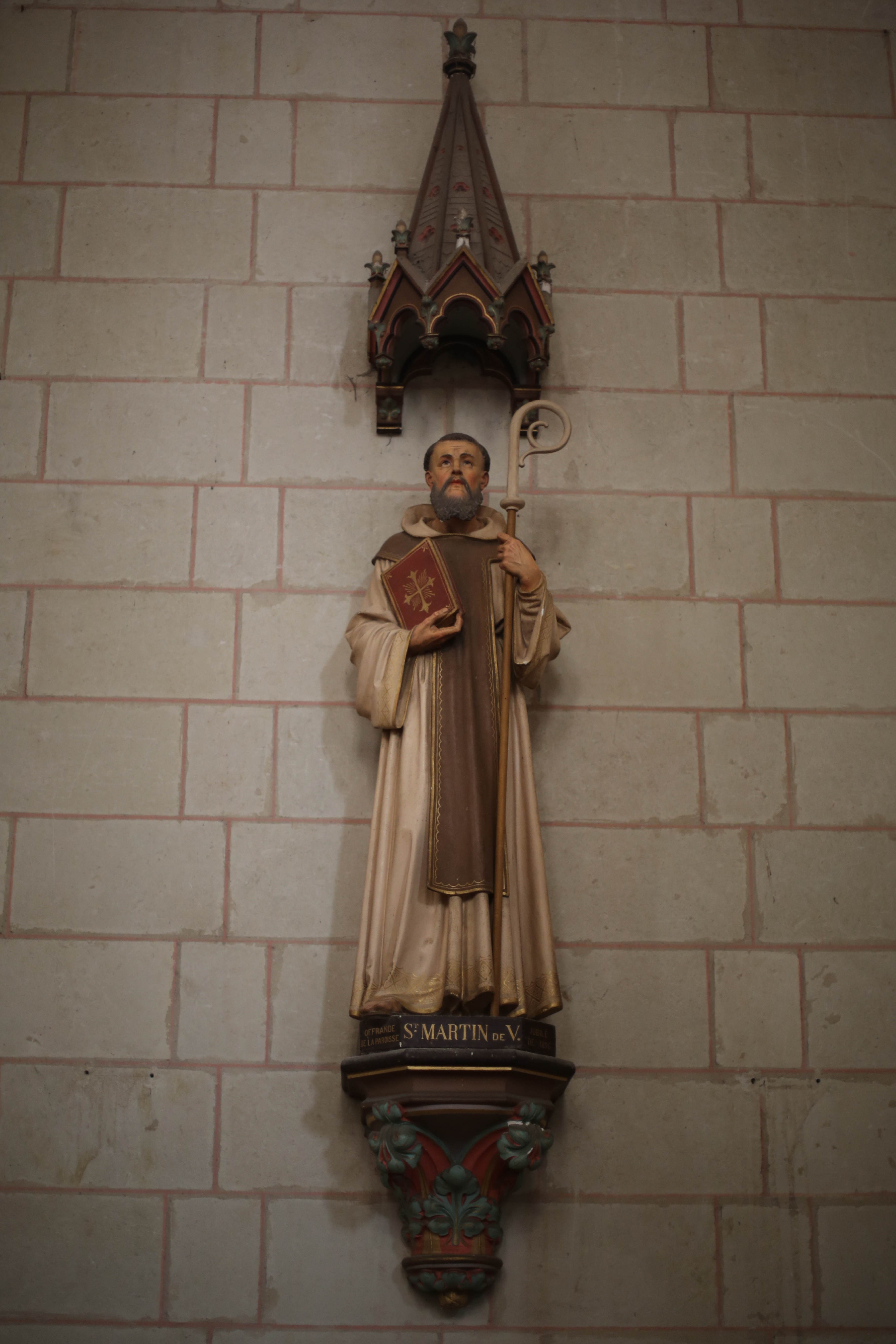 Église Saint-Martin du Lion-d'Angers : statue de Martin de Vertou.